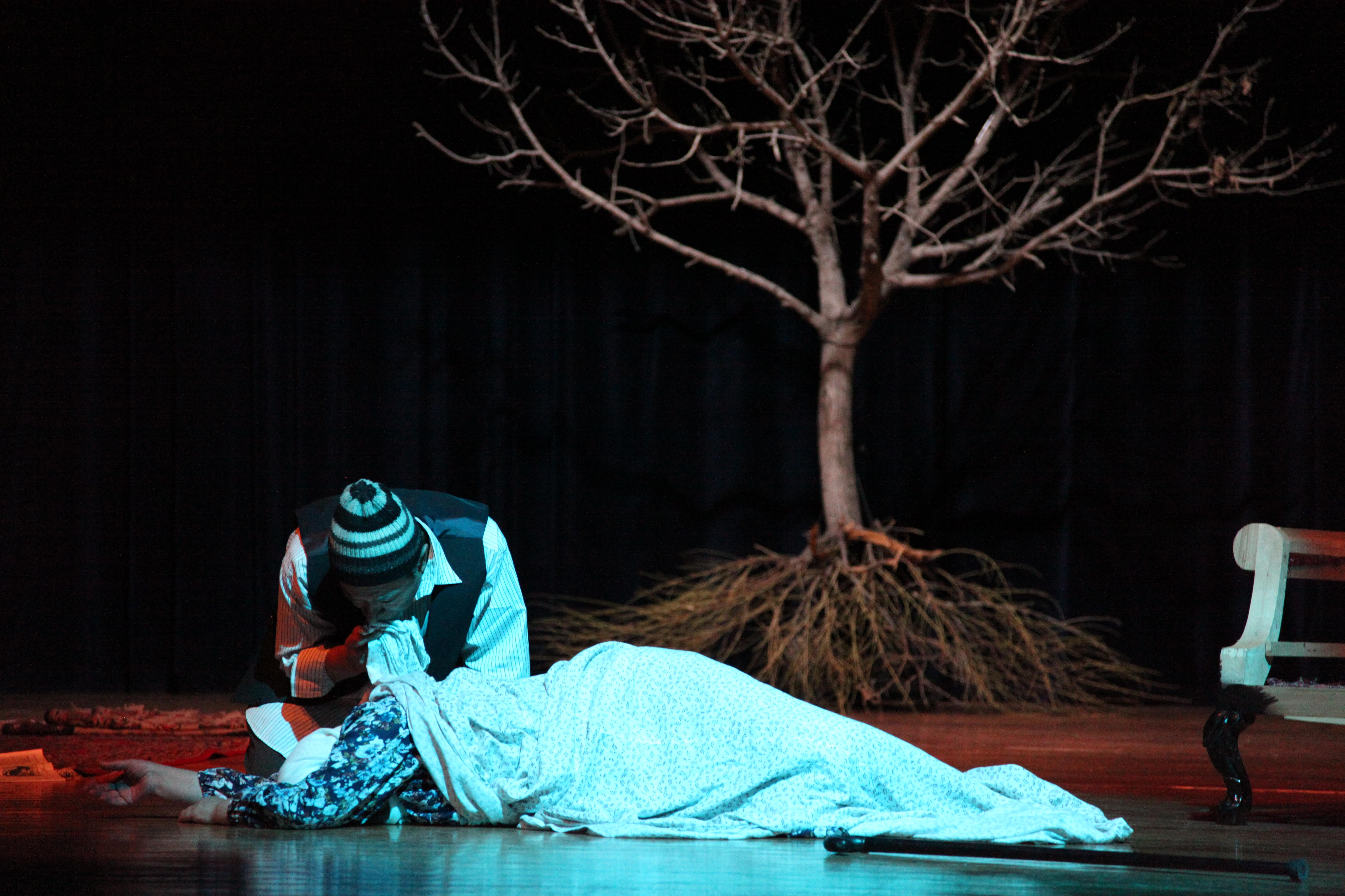 آدم خوابش میگیره ۱۳۹۰ فرهنگسرای نیاوران